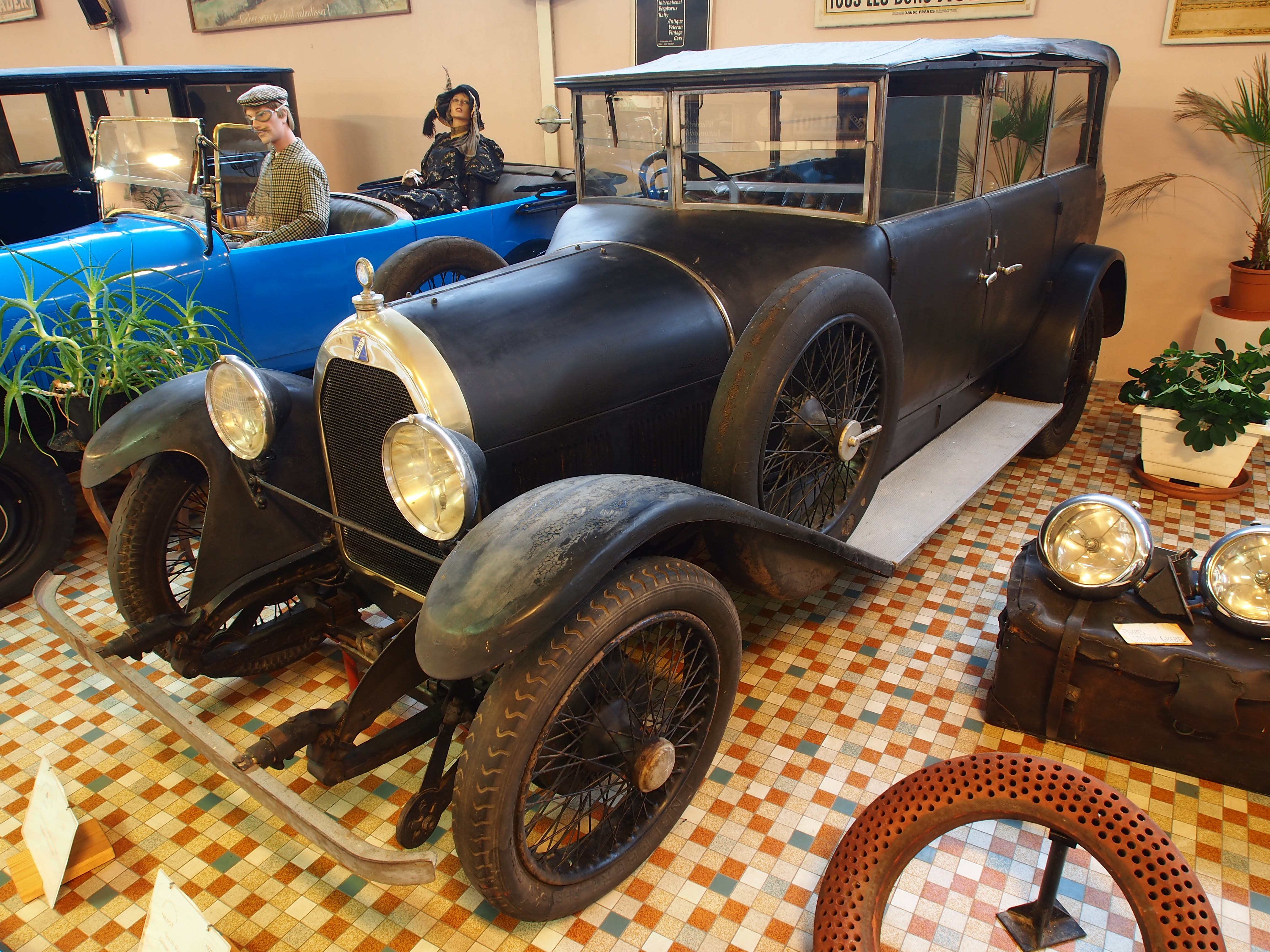 Photographed at the Musée Automobile de Vendée, France.